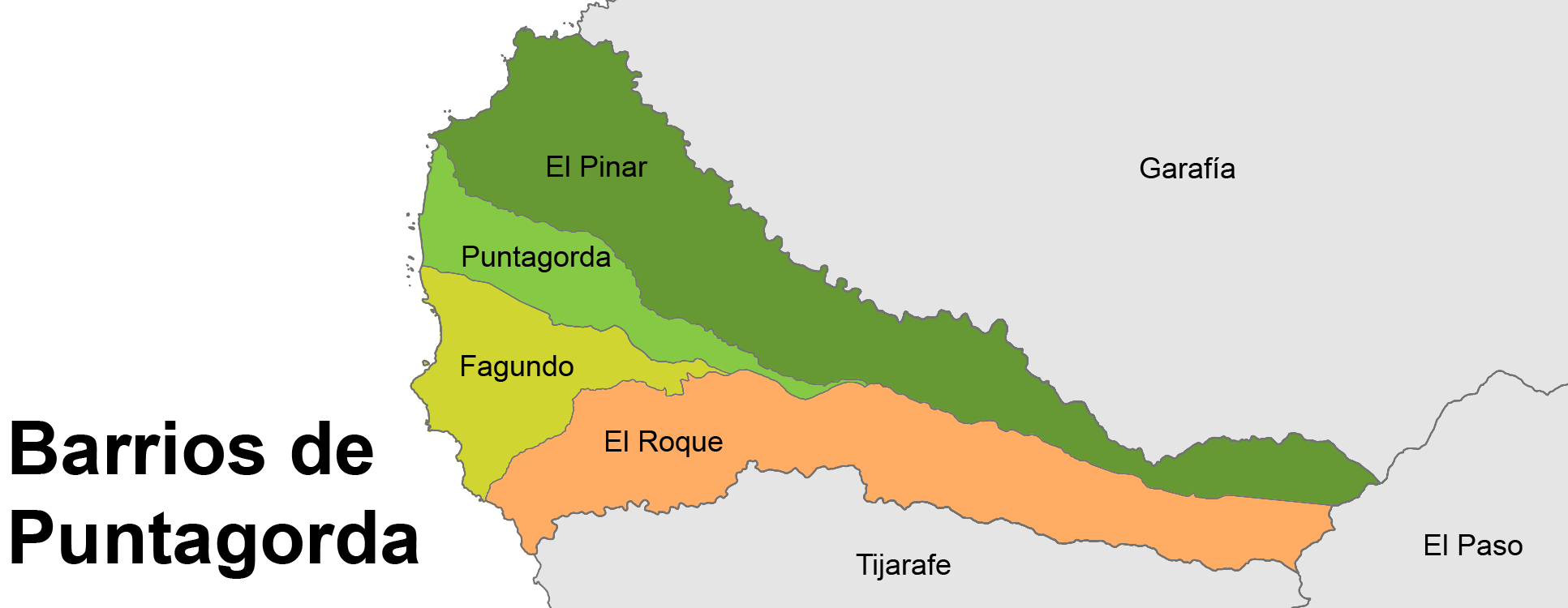 Mapa Barrios de Puntagorda